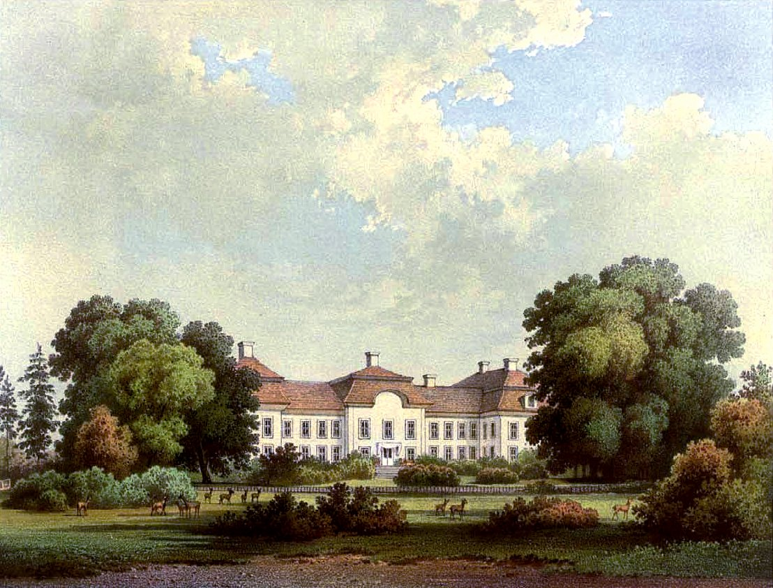 Gut Rothmannshagen, Kreis Demmin